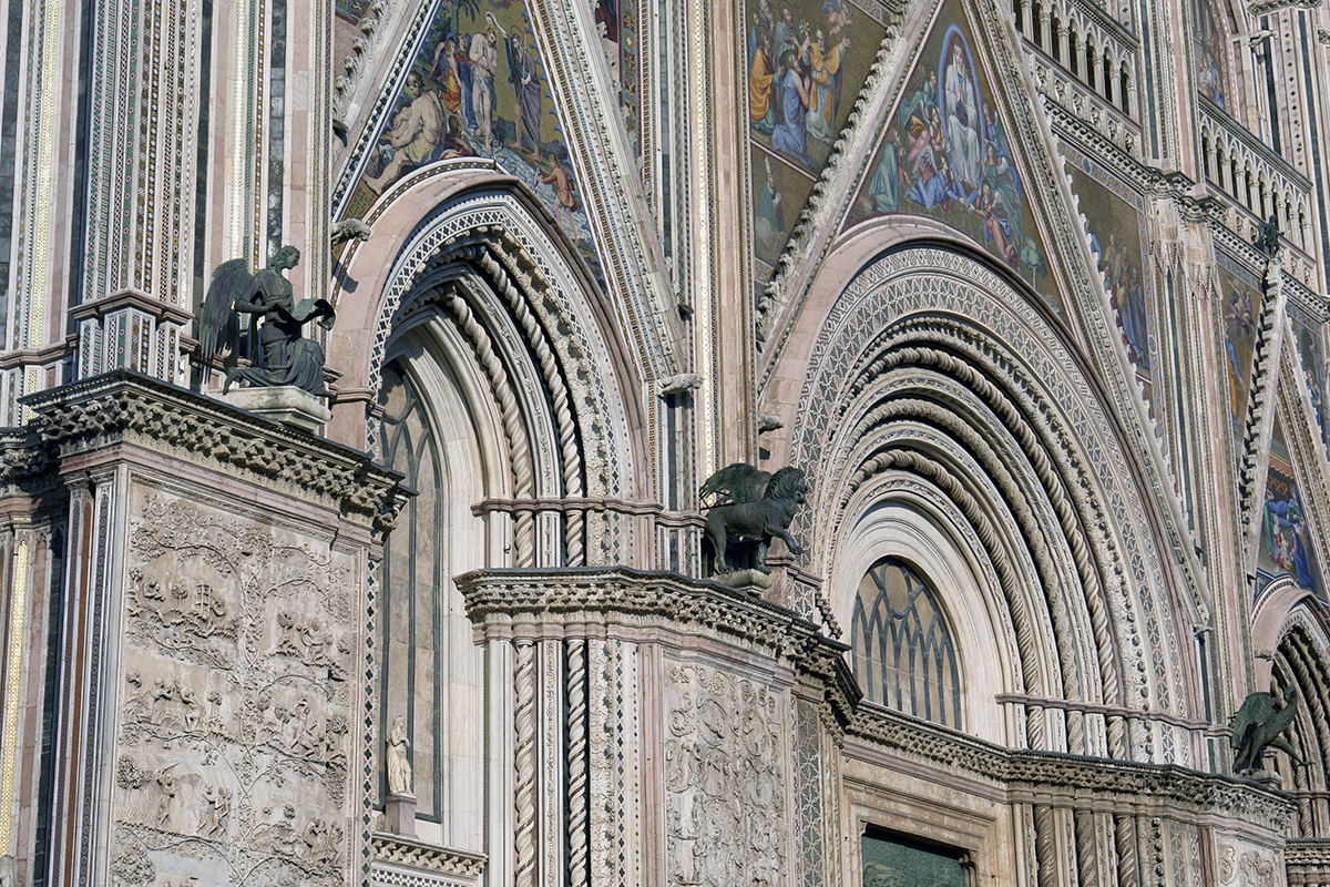 Kathedrale, Hauptfassade, Detail